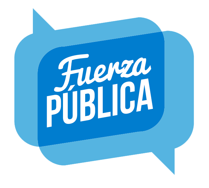 Logotipo Fuerza Pública